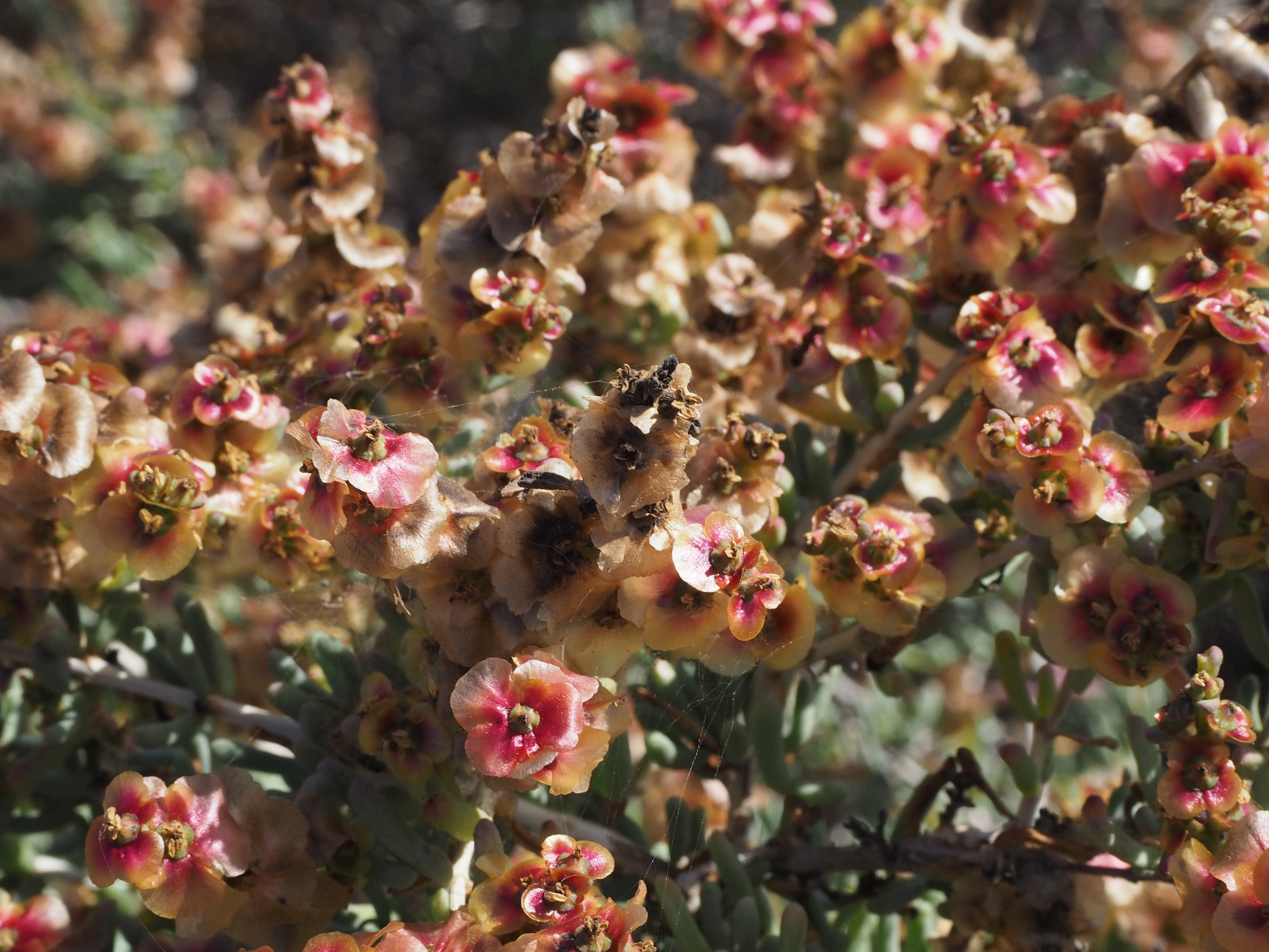 Salsola divaricata (matabrusca negra), flores. Malpaís de Rasca, Tenerife.